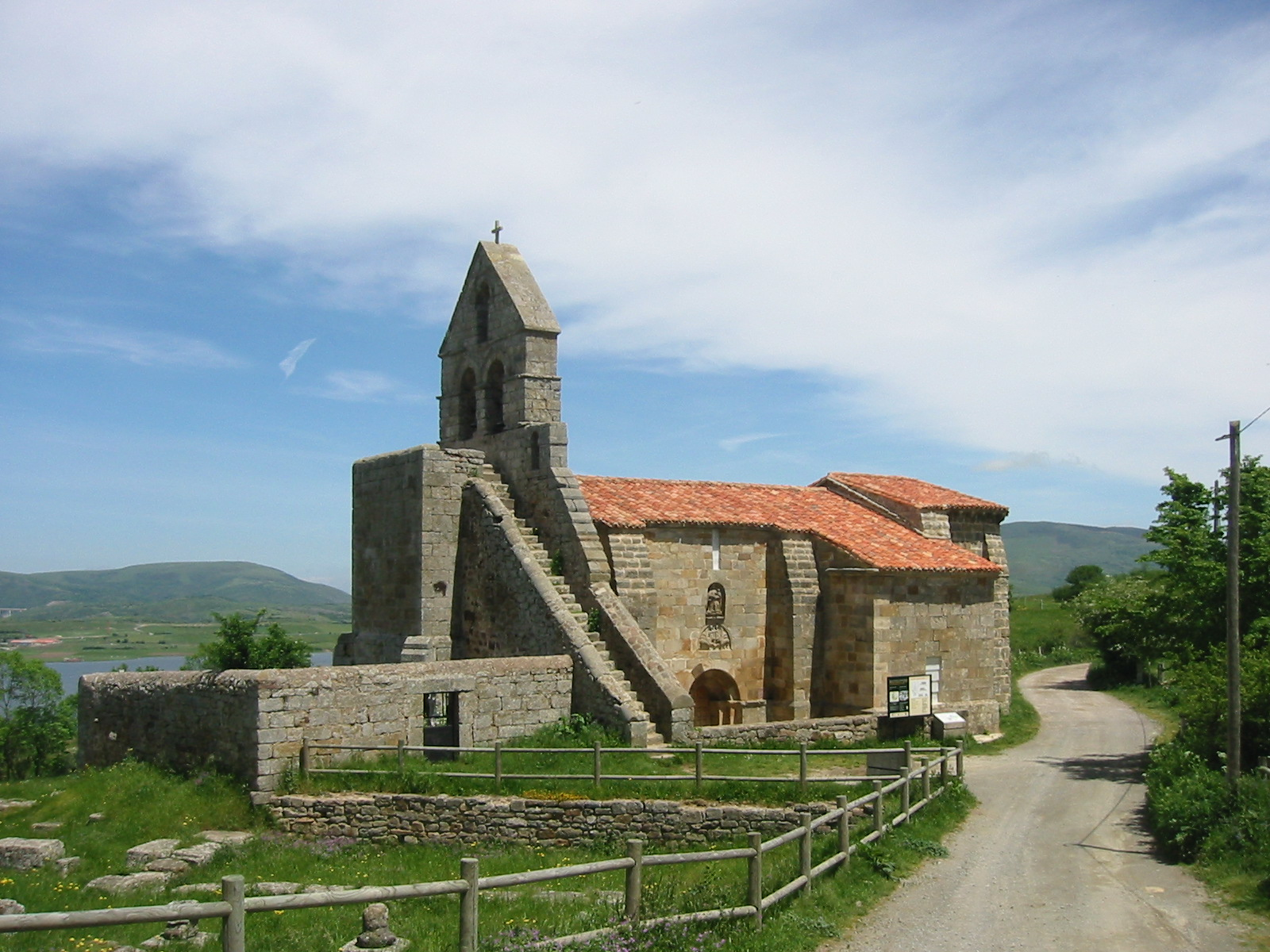 Kirche in Rotortilla am Embalse de Ebro